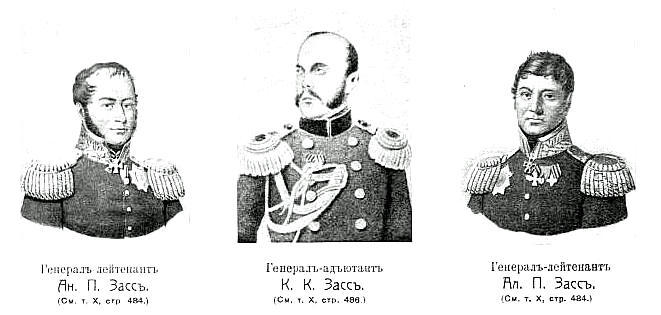 Это изображение было использовано для иллюстрирования статьи «Зассы» опубликованной в десятом томе «Военной энциклопедии», который был издан книгоиздательским товариществом И. Д. Сытина в 1912—1913 гг. в столице Российской империи городе Санкт-Петербурге.